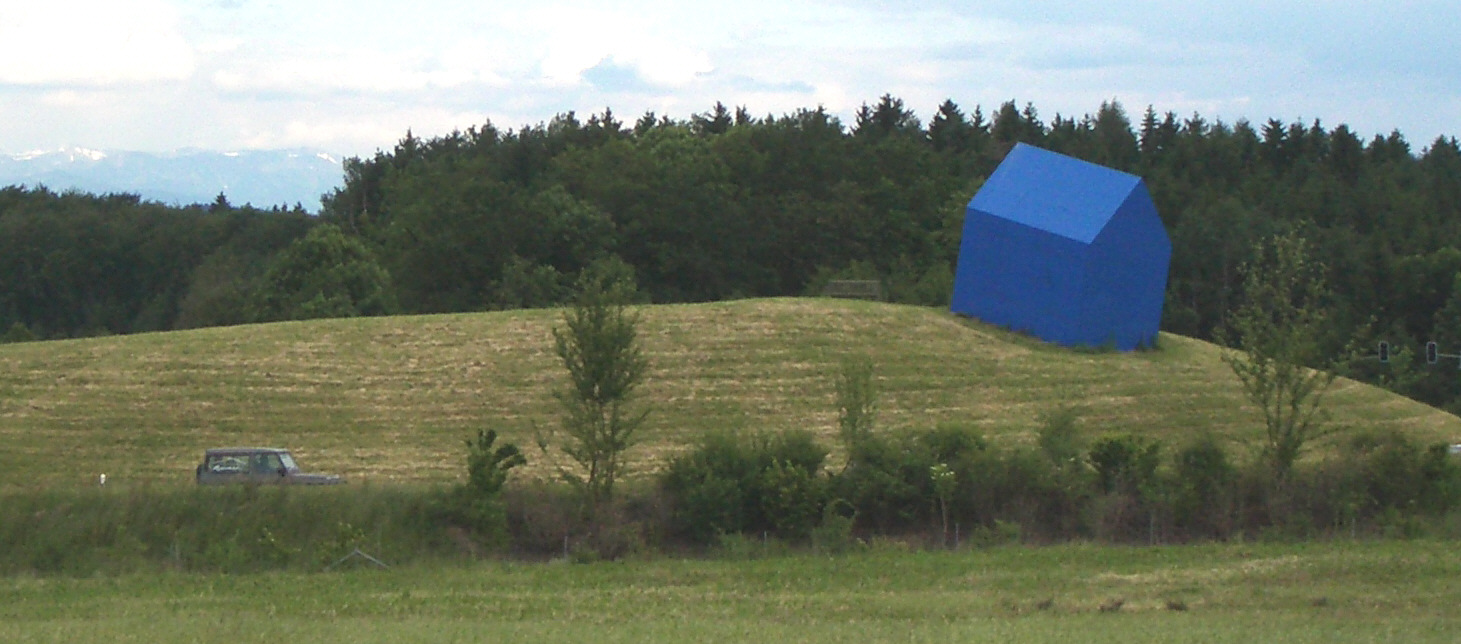 „Das Blaue Haus“ von Ottmar Hörl, Aluminiumskulptur mit Linde und Bank von 1997-1998, ca. 6 m x 6 m x 4 m. Stadteingang West (Verkehrsinsel), Ravensburg, Deutschland.